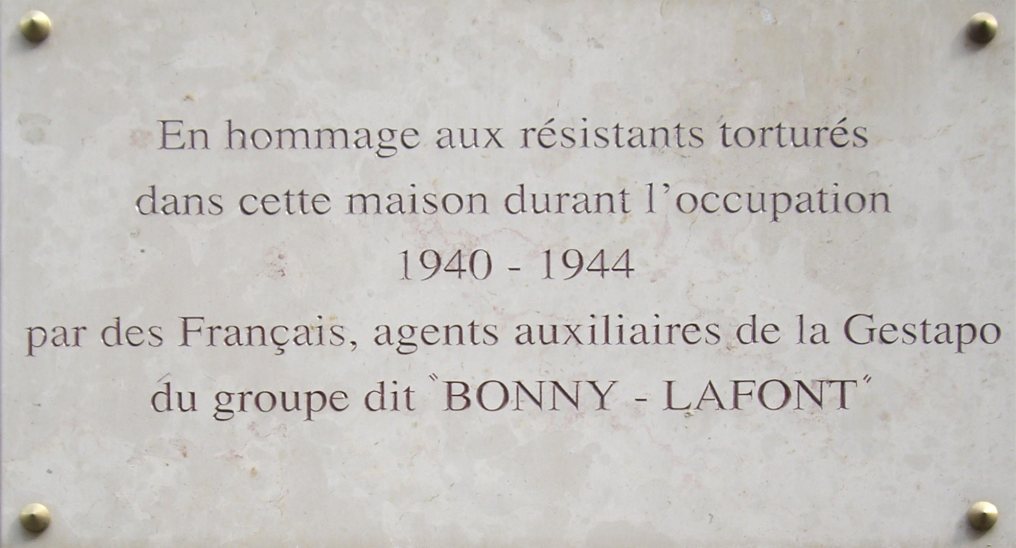 Plaque apposée au n° 93 de la rue Lauriston, Paris 16e.En hommage aux résistants torturés dans cette maison durant l'occupation 1940-1944 par des Français, agents auxiliaires de la Gestapo du groupe dit « Bonny-Lafont ». La plaque a été retiré en Avril 2014.